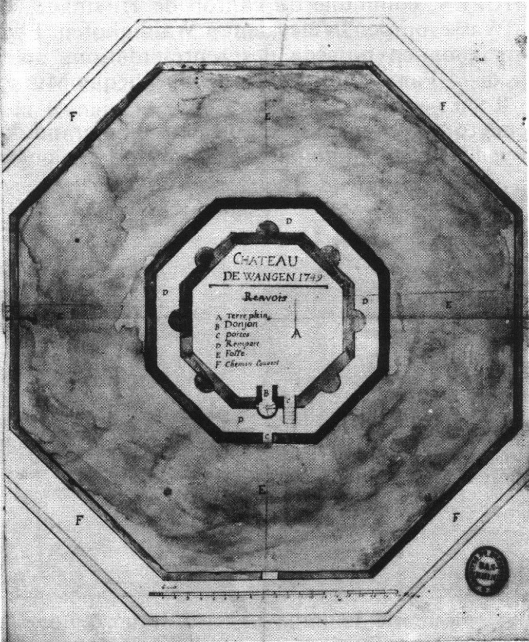 Burg Wangen, Elsass, Plan von 1749